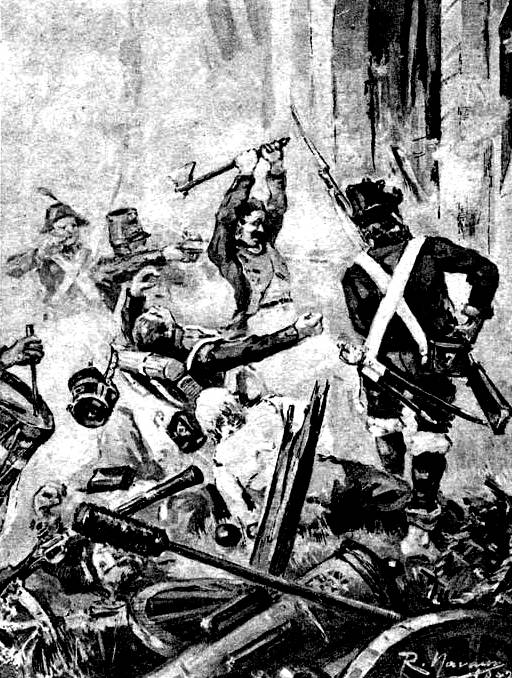 Os guerrilleiros galegos penetran en Vigo pola porta da Gamboa